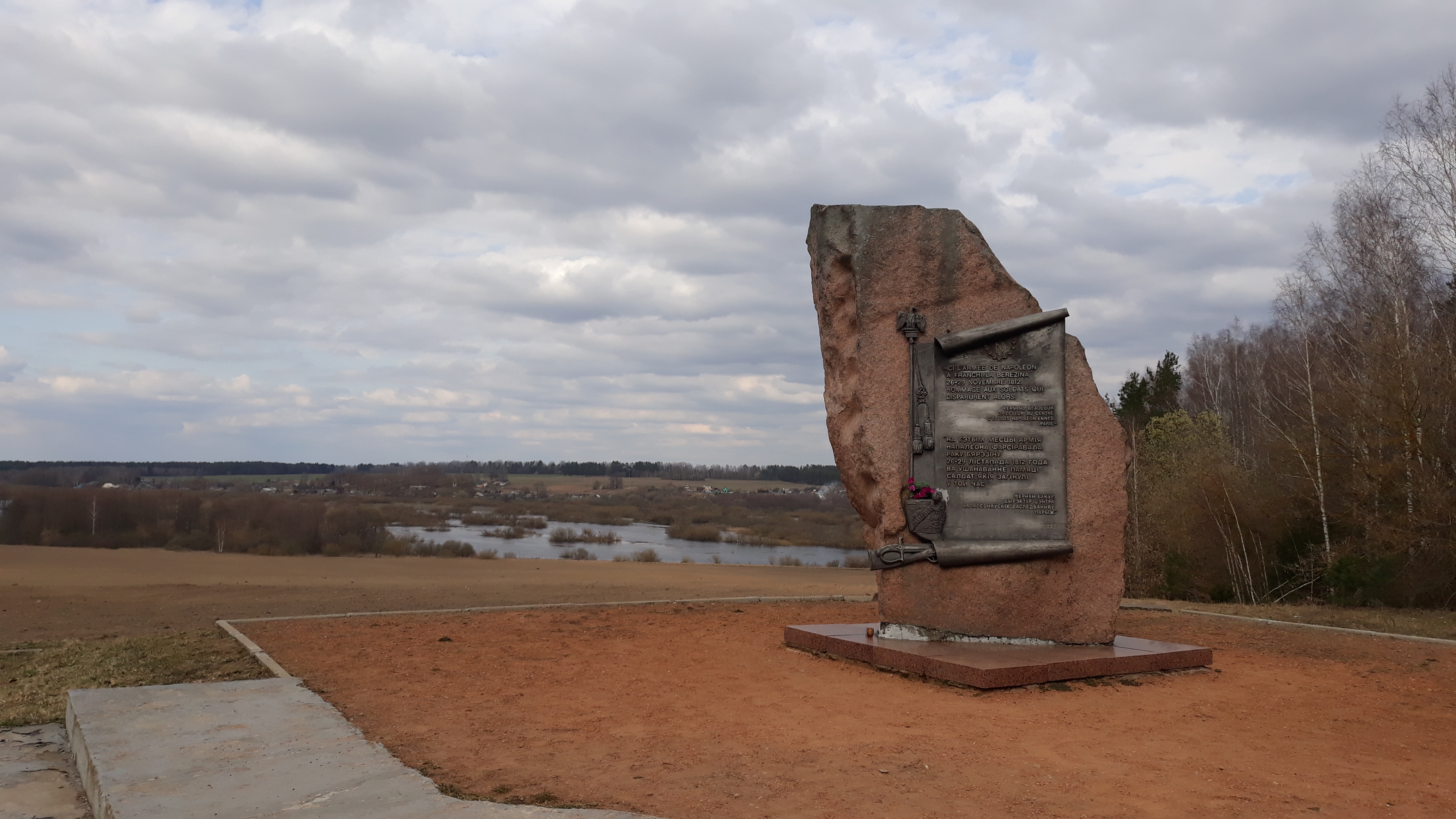 Помнік французскім воінам, якія загінулі на Брылёўскім поле падчас пераправы праз Бярэзіну 14-17 лістапада 1812-га года і магіла невядомага французскага салдата